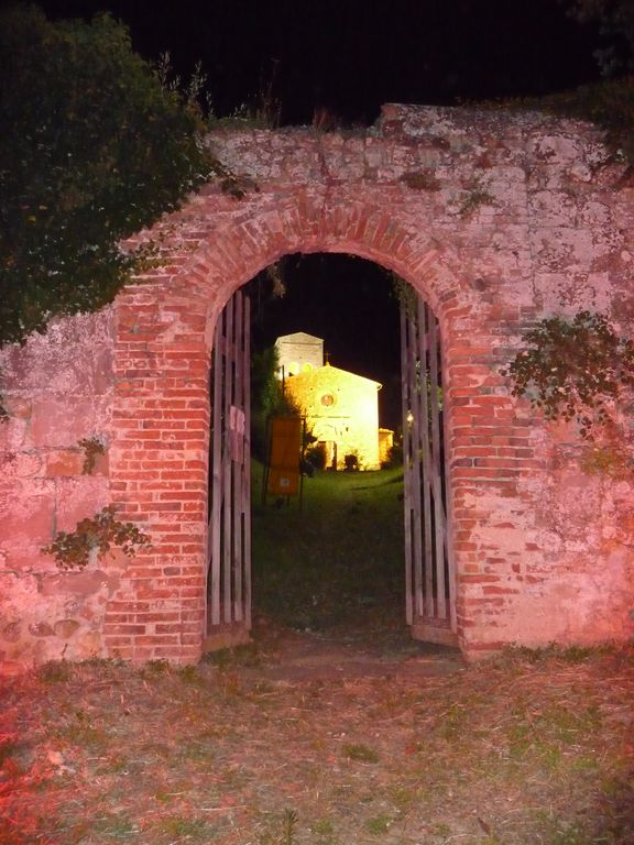 Montelupo Fiorentino (FI - Italia) - Prioria di San Lorenzo vista al di fuori delle antiche mura